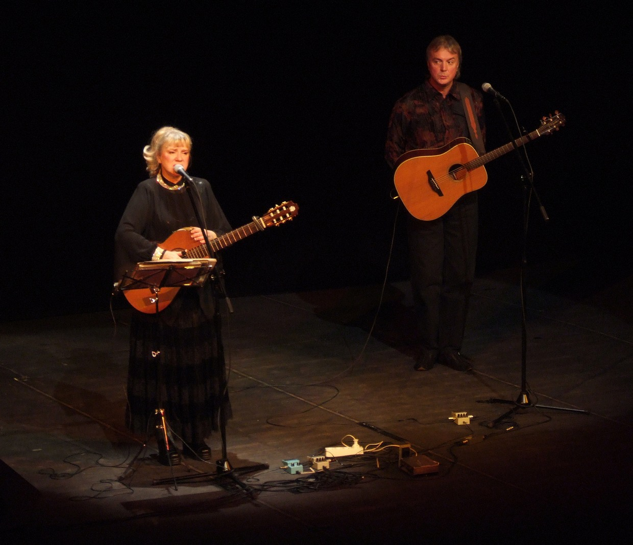 Zhanna Bichevskaya (Жанна Бичевская) at a concert in Zielona Góra, Poland. October 2006 Żanna Biczewska (z mężem) na scenie Teatru Lubuskiego w Zielonej Górze. Październik 2006 Author: Mohylek 15:00, 1 December 2006 (UTC)